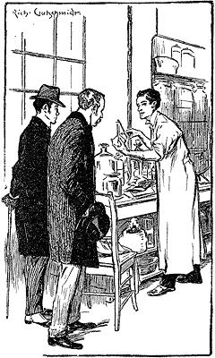 Illustration einer Sherlock Holmes-Geschichte